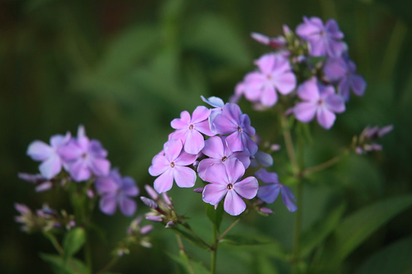 Флокс 'Незабудка'. Константинова, 2002 / Breeder: Konstantinova, 2002.